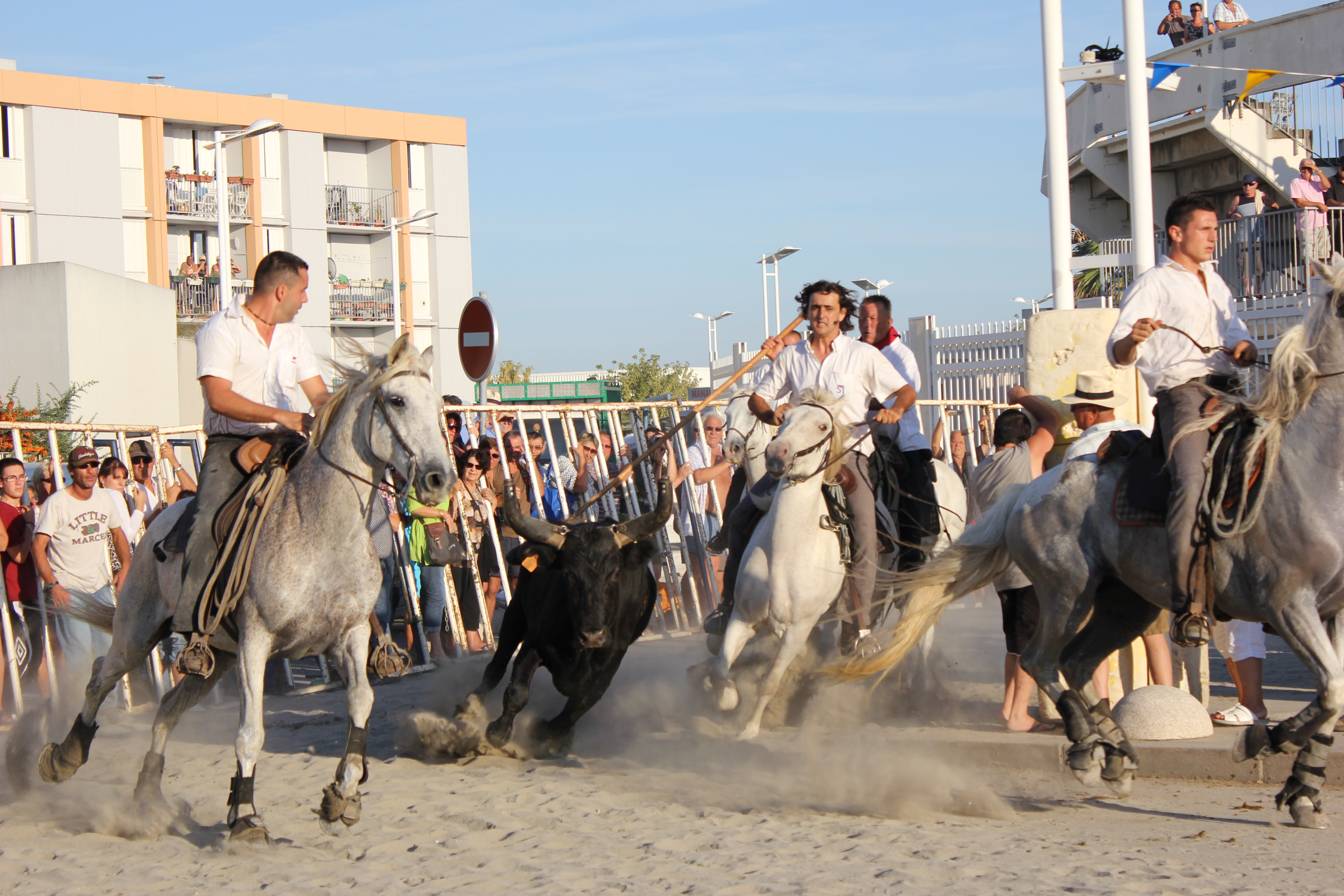 Lokaal gebeuren na de Courses Camargueses waarbij de stieren een voor een terug naar de vrachtwagen begeleid worden